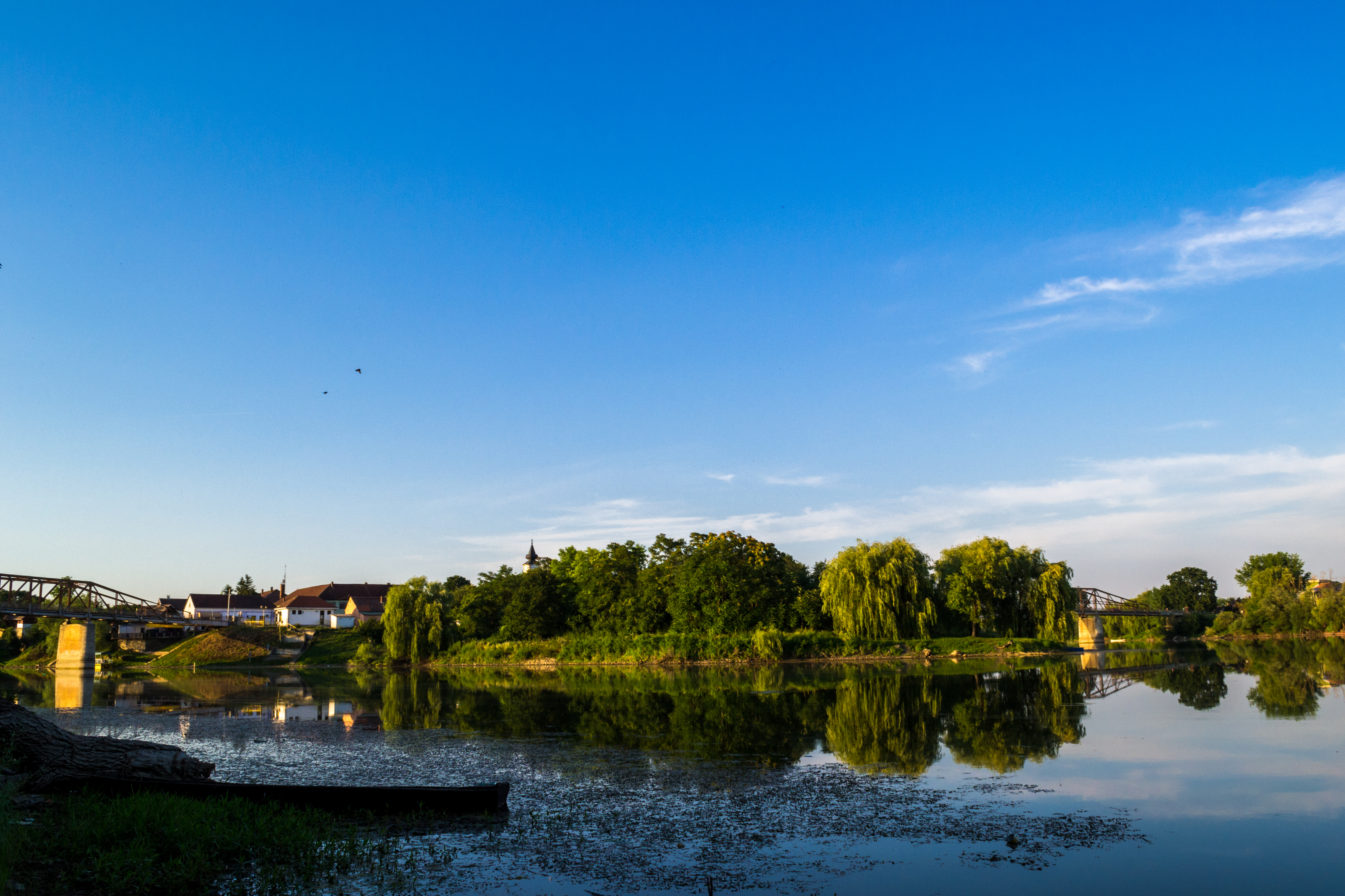 Ово је фотографија заштићеног природног добра у Србији под шифром: НП01This is a a photo of a natural area in Serbia with ID: НП01 Mesto gde se spajaju reke Bosut i Studva, Morovic